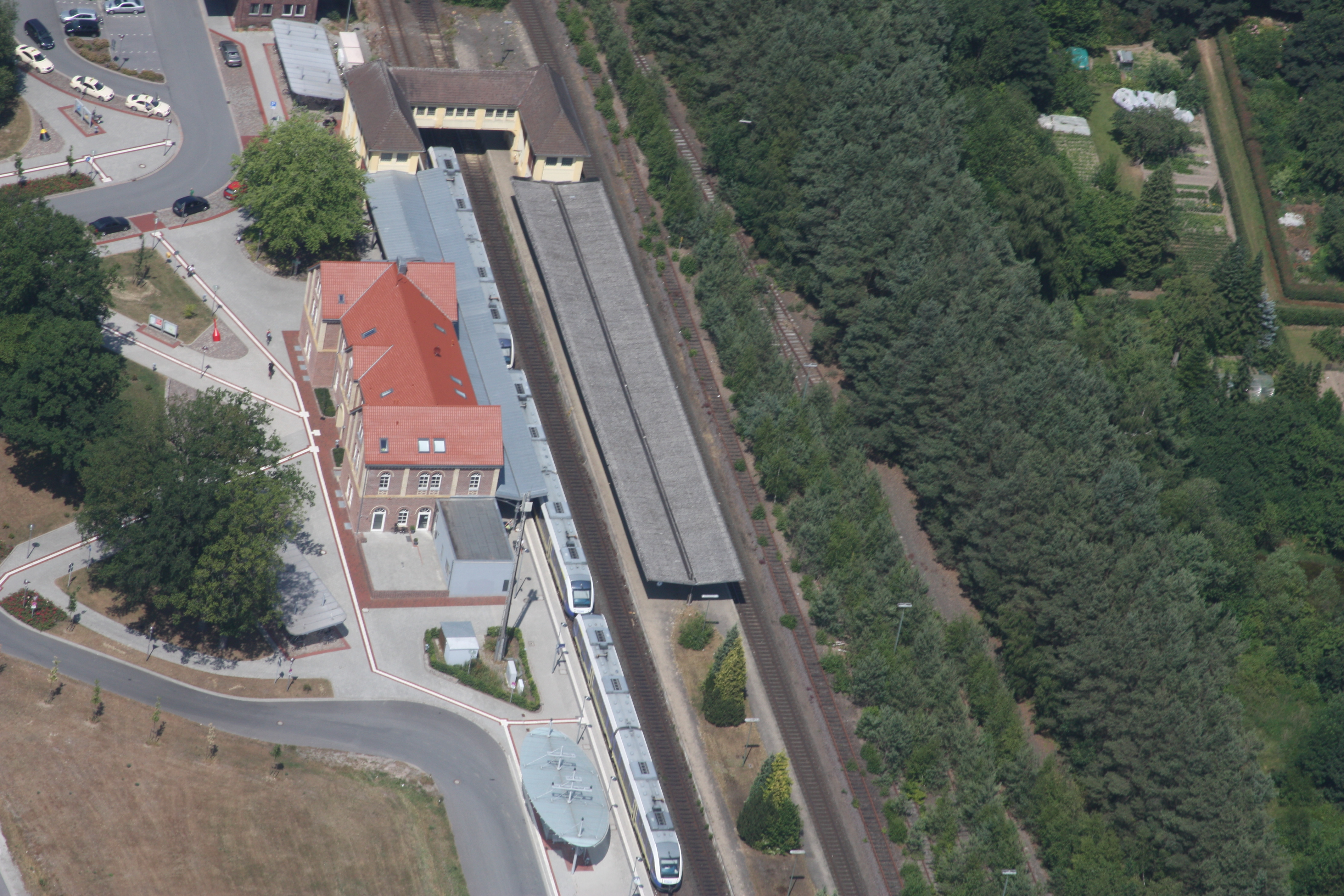 Flug über Varel; von Dangst kommend nach Oldenburg; Flughöhe 500 m = 1500 ft; Juli 2010